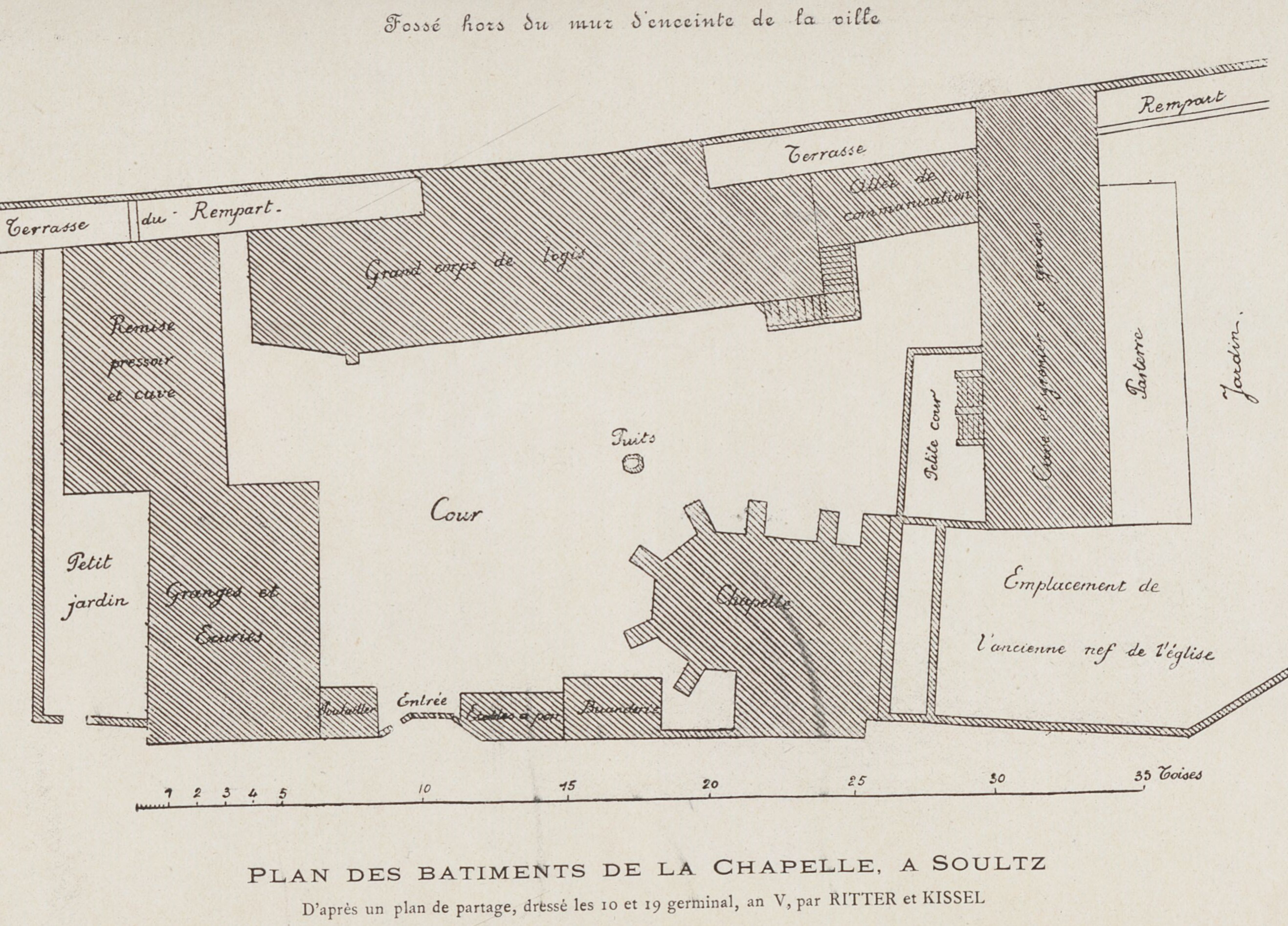 Plan fait A. Gasser dans son article « Les maisons religieuses de Soultz : La chapelle du Lieu-Croissant et des Trois-Rois », dans Fédération des sociétés d'histoire et d'archéologie d'Alsace, Revue d'Alsace, t. LVII, Colmar, 1906, p. 621-641 ; d'après un plan de partage dressé les 10 et 19 germinal de l'an V par RITTER et KISSEL